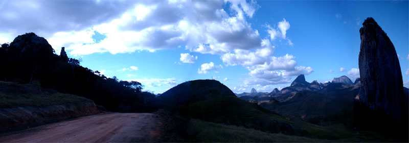 vista do alto do cristo